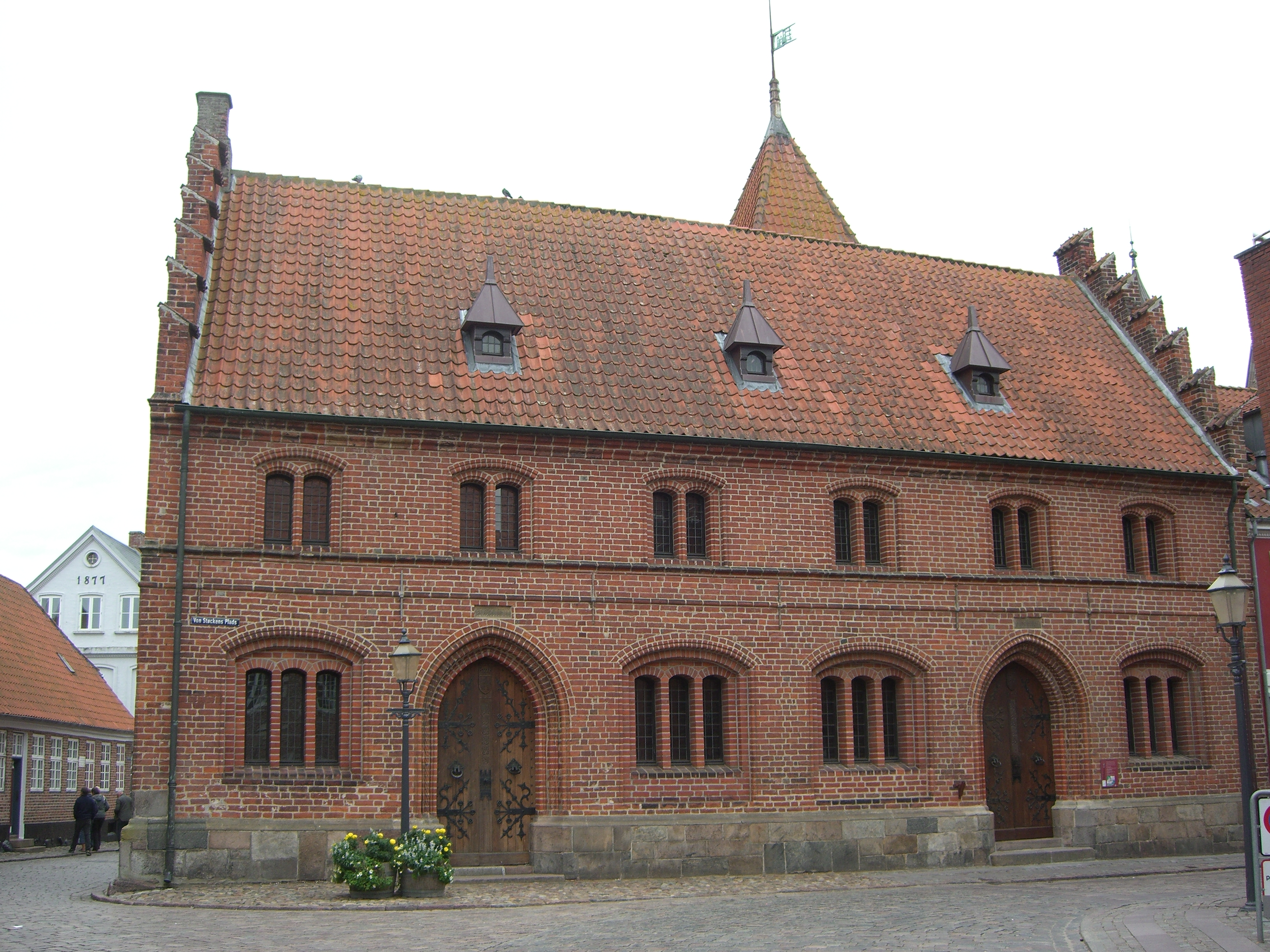 Ribe gamle Rådhus